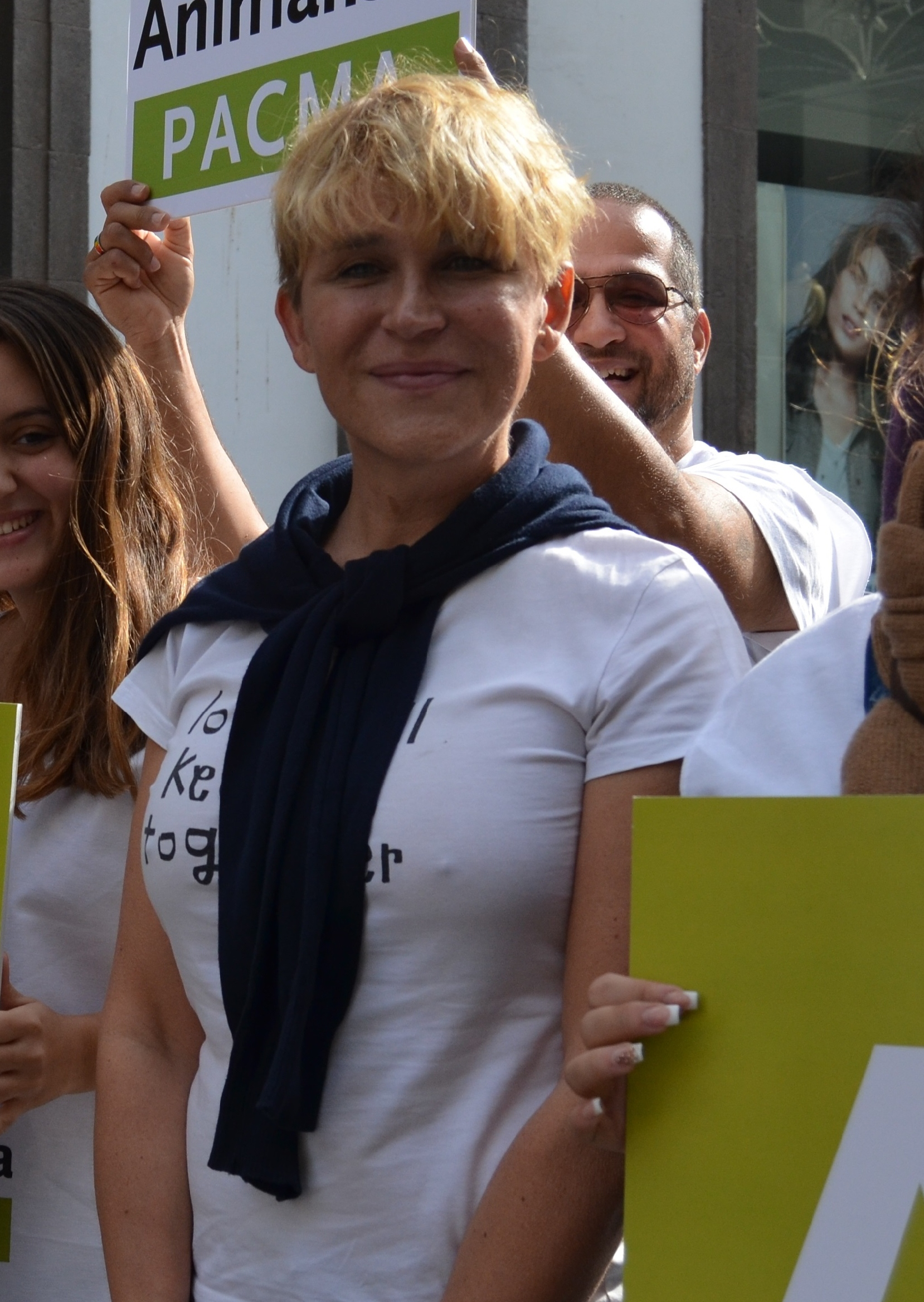 Las Palmas de Gran Canaria En la foto Antonia San Juan, actriz y defensora de los animales, 2013.